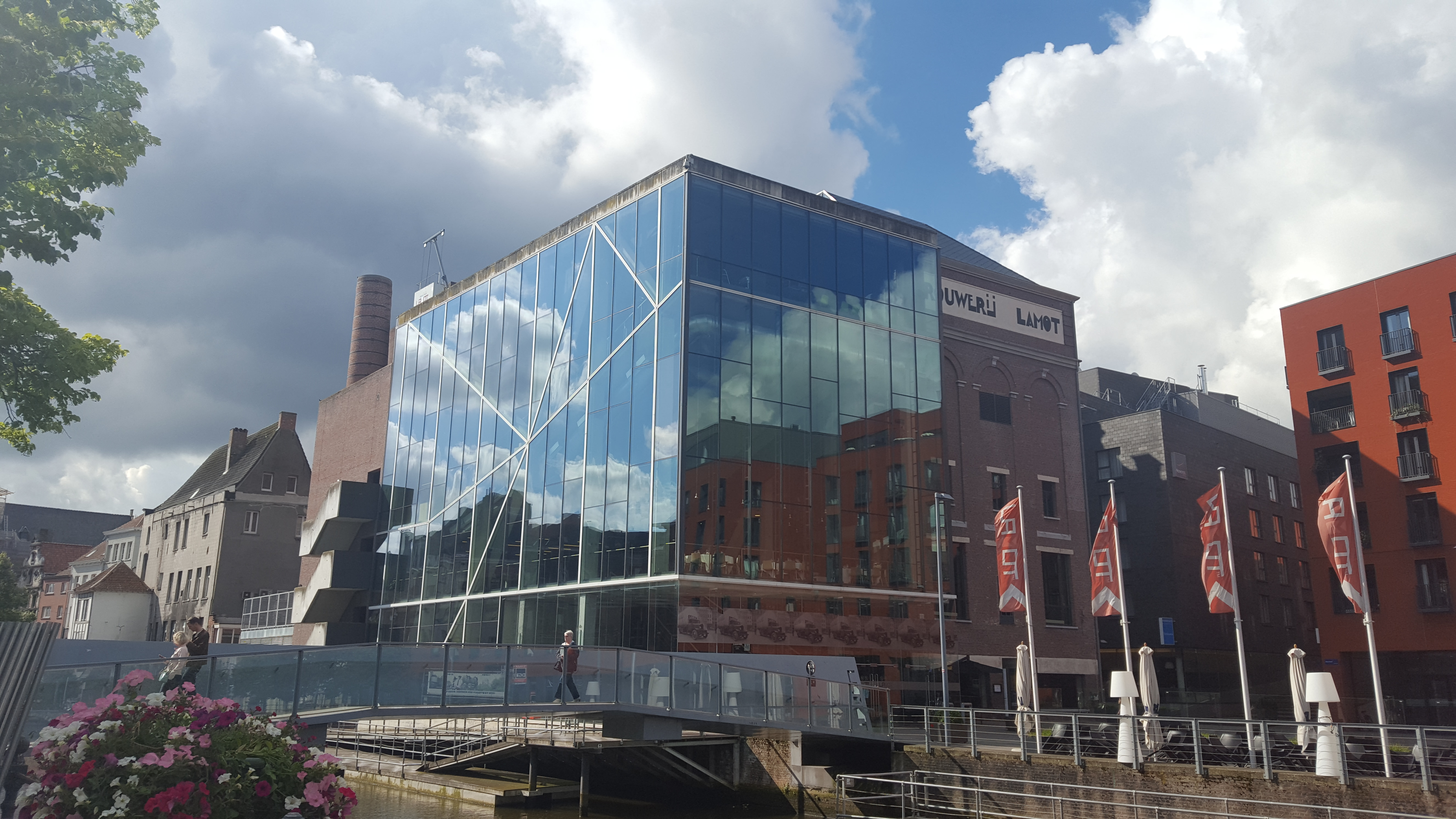 Lamot, Mechelen, België